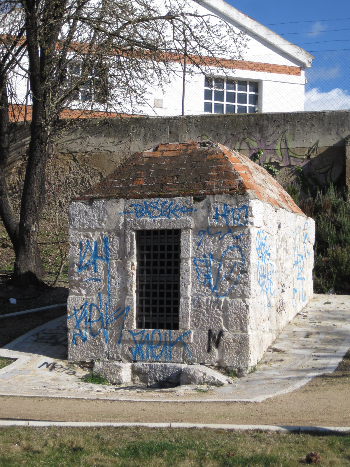 Arca Real número 9 de la conducción que, construida a finales del siglo XVI, abastecía de agua a Valladolid (España).